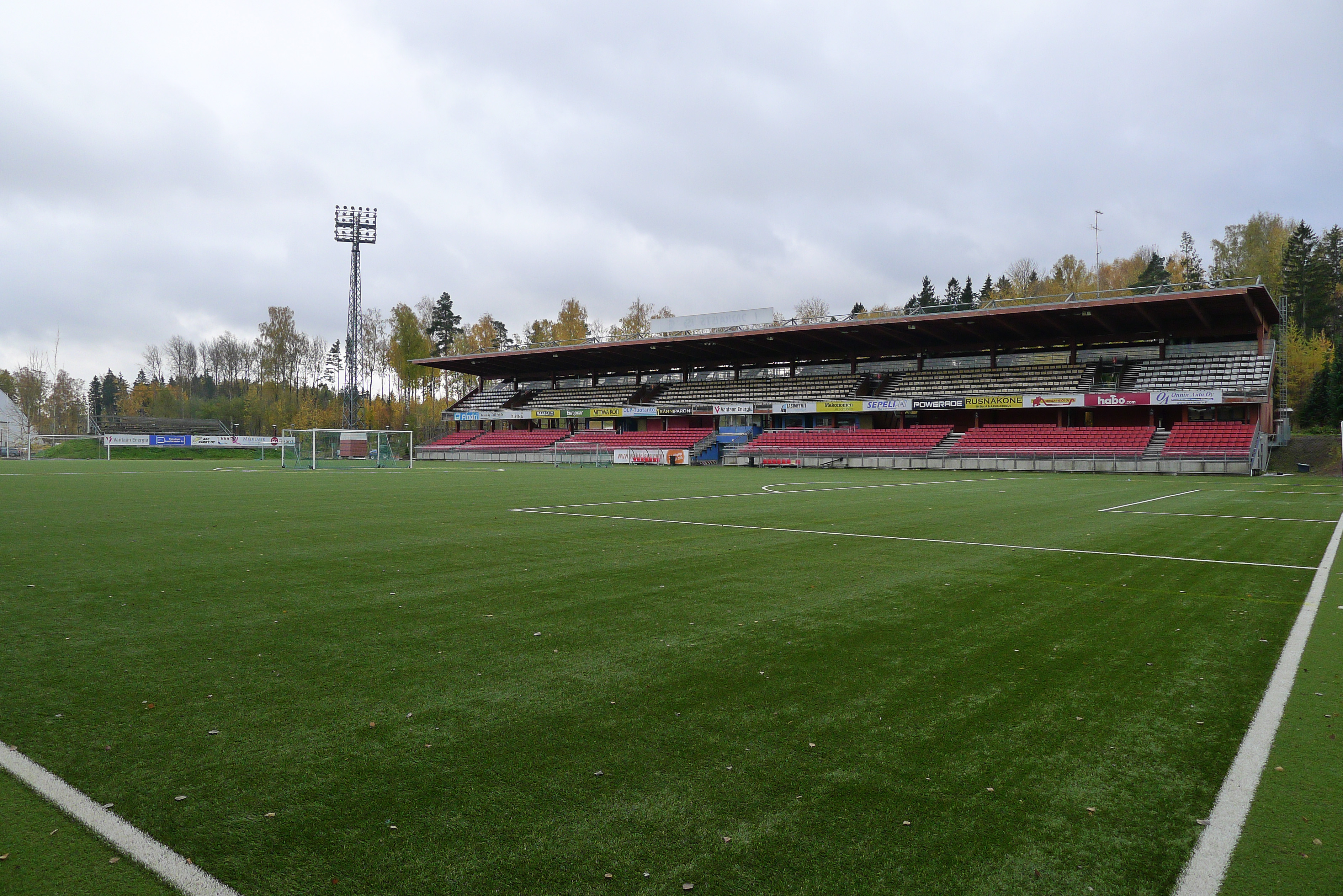 Myyrmäen jalkapallostadion 11.10.2014